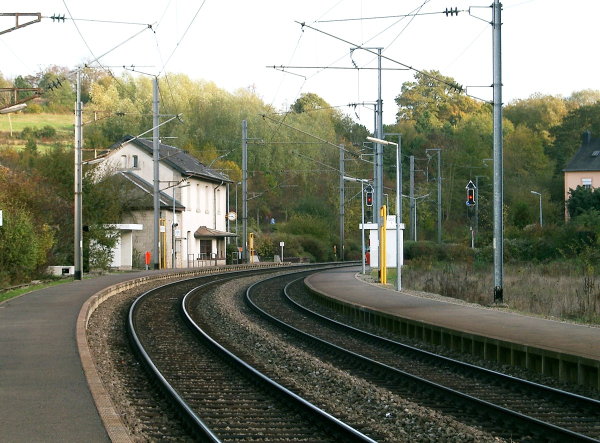 Gare vu Bieles-Zolwer; Source: Eege Foto vum User:Pecalux; Datum: 10.11.2006